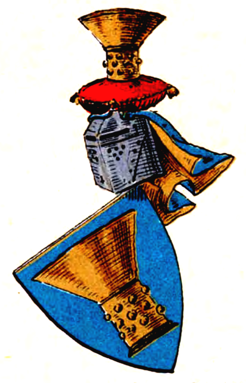 Wappen derer von Küssenberg